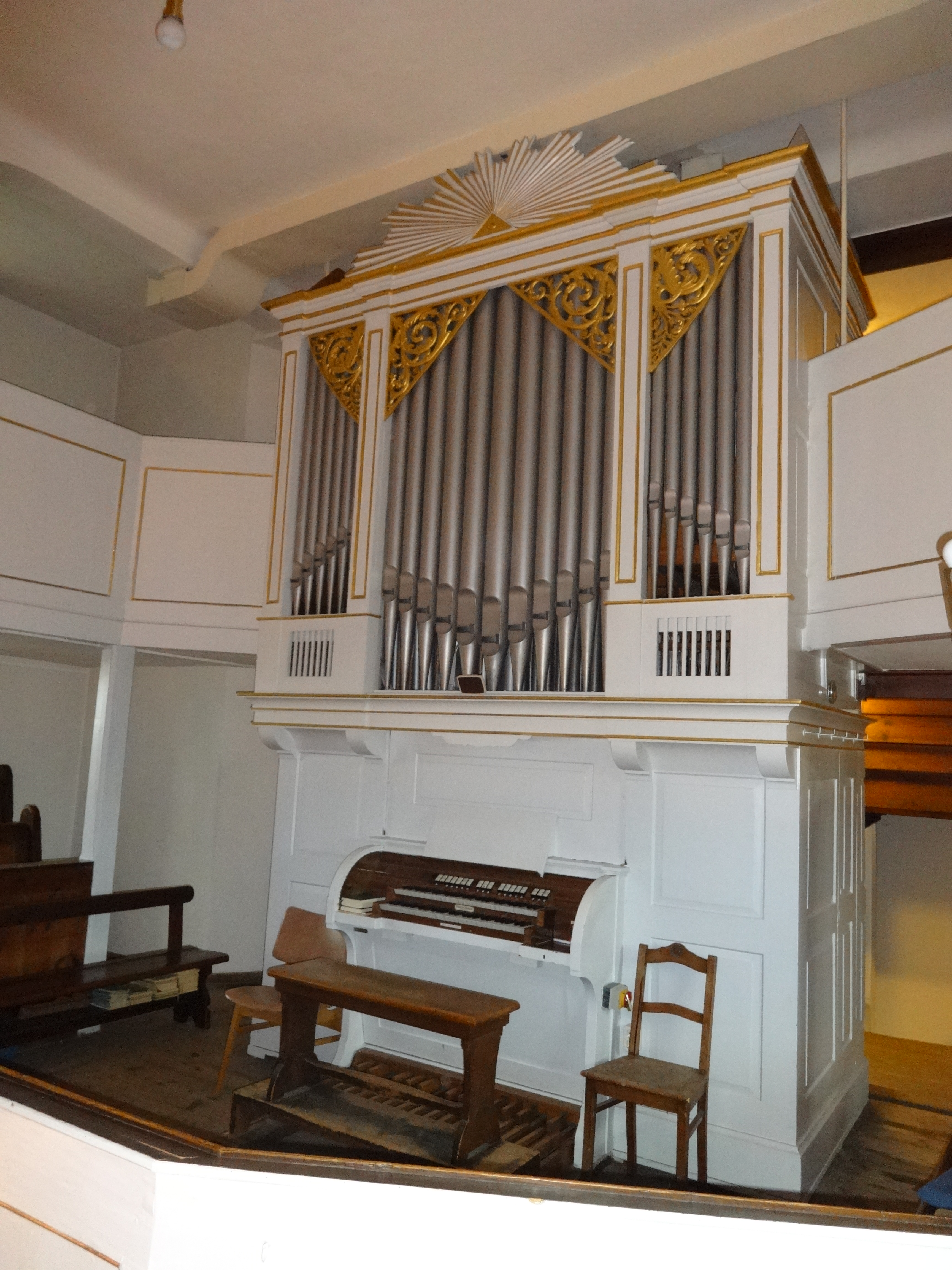 Jehmlich-Orgel der Alten Kirche in Dresden-Klotzsche